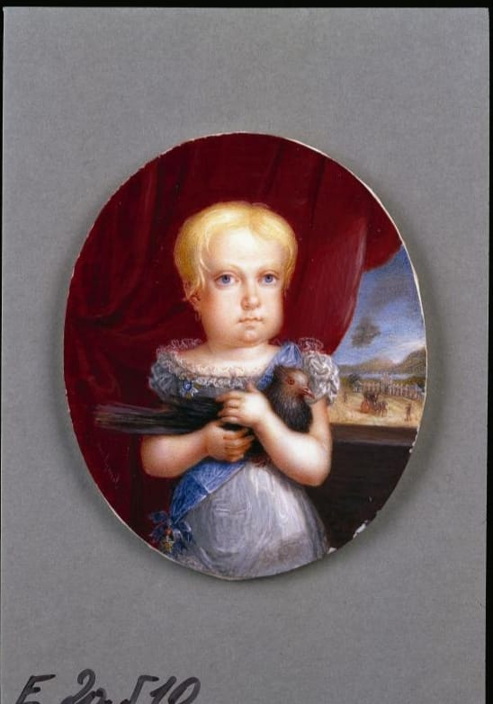 Dona Paula Mariana Joana Carlota de Bragança (1823-1833) – Filha de D. Pedro I e da Imperatriz Leopoldina.